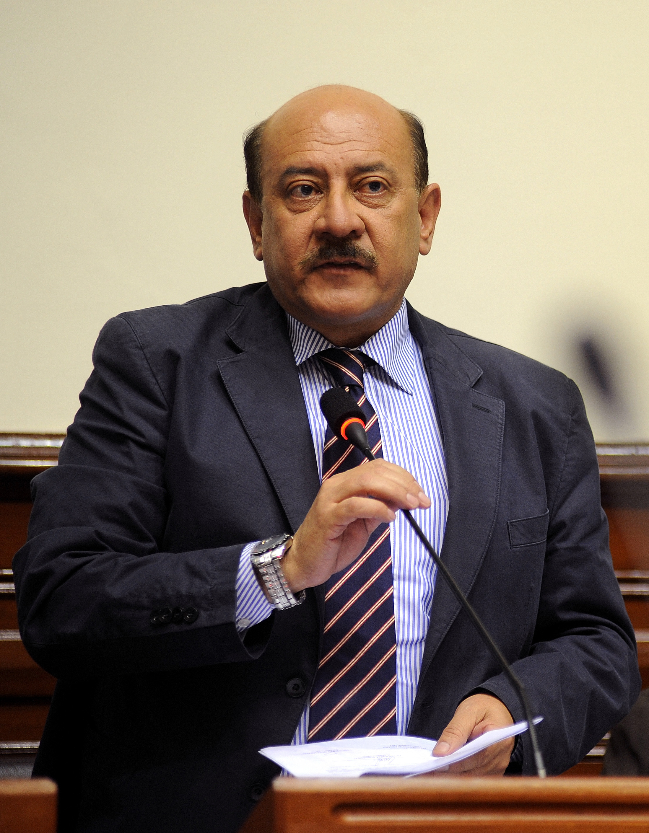 El congresista Walter Menchola Vásquez fija su posición en el debate parlamentario realizado esta tarde por el Pleno.